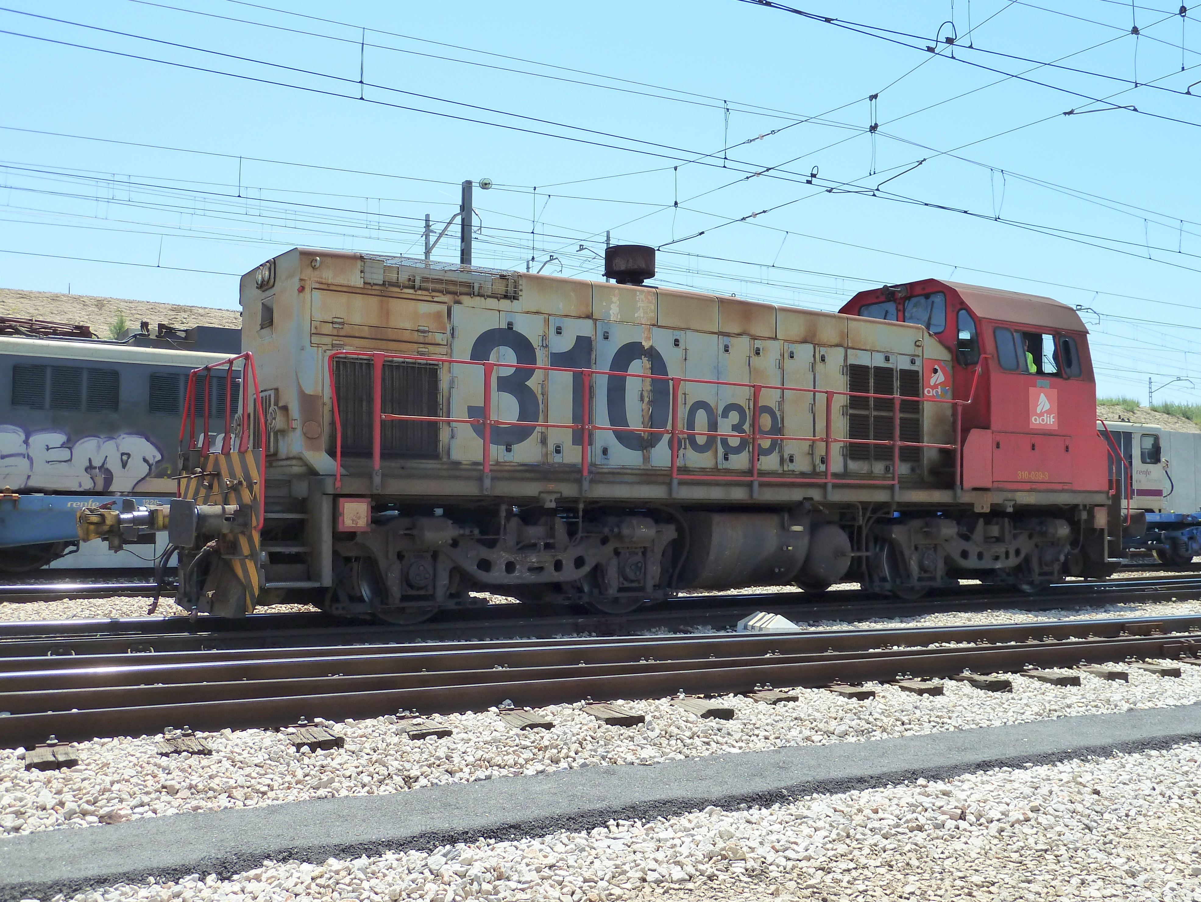 Tractor Diésel de Maniobra ADIF Mercancía (ex RENFE) Serie 310-039.3: MACONSA, nº constr. 1798, año 1990, Depósito: Venta de Baños, Palencia - Maniobrando en Embajadores-Abroñigal (Madrid).